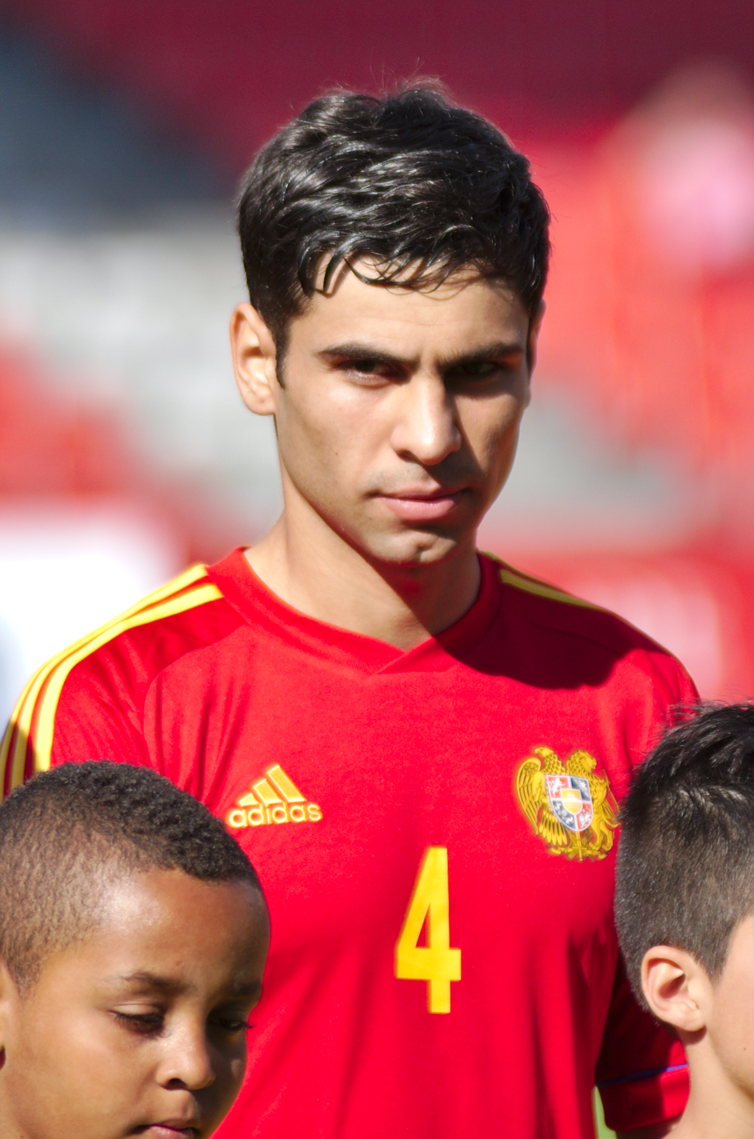 Algérie - Arménie - 20140531 - Taron Voskanyan